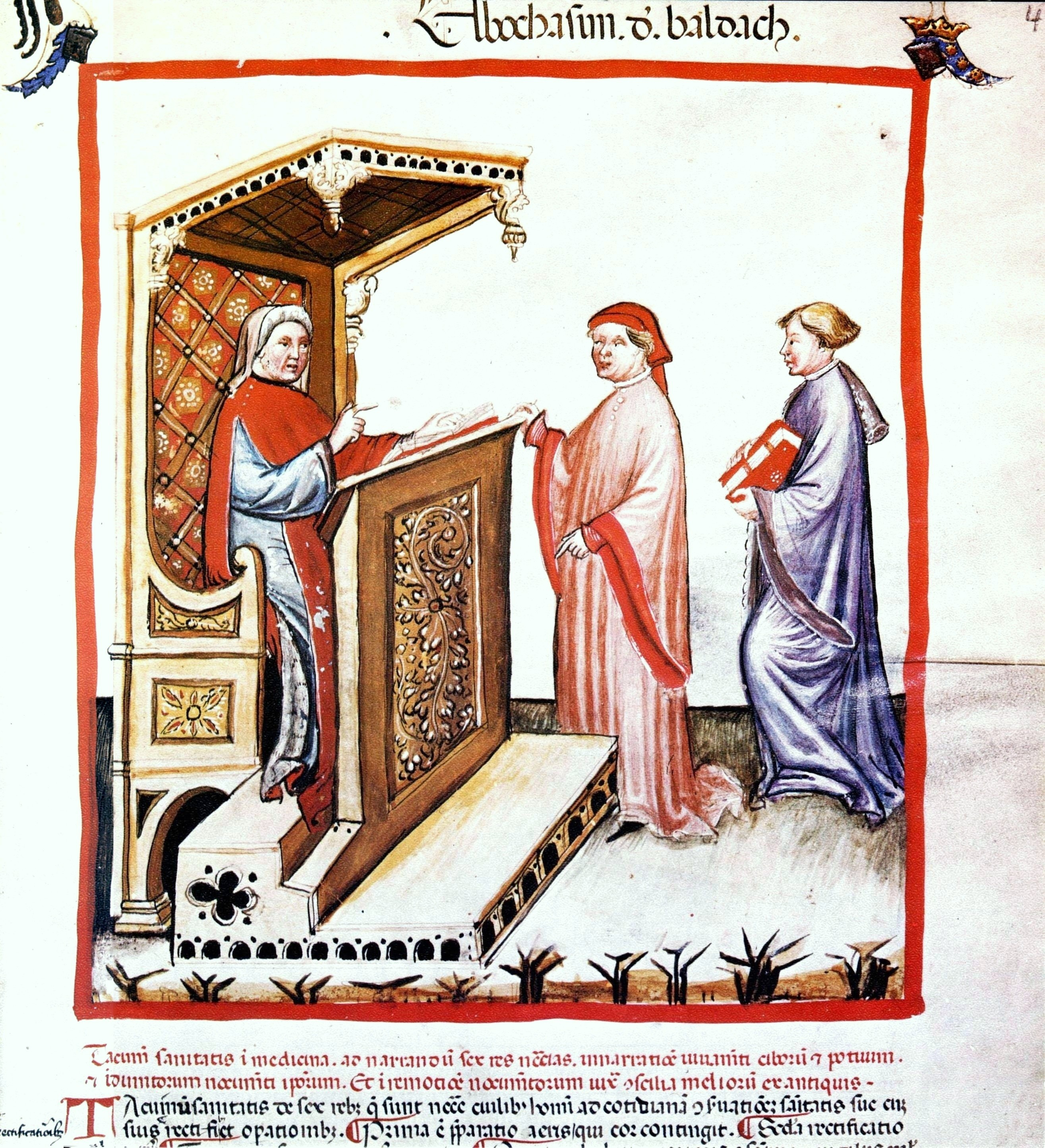 Autorenbild aus dem Kodex Tacuinum Sanitatis (Codex Vindobonesis Series nova 2644 der Österreichischen Nationalbibliothek). Der Arzt Ibn Butlan (links) und zwei seiner Schüler.